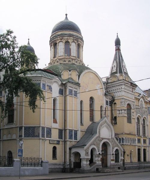 Храм иконы Божией Матери «Взыскание погибших» на Зацепе